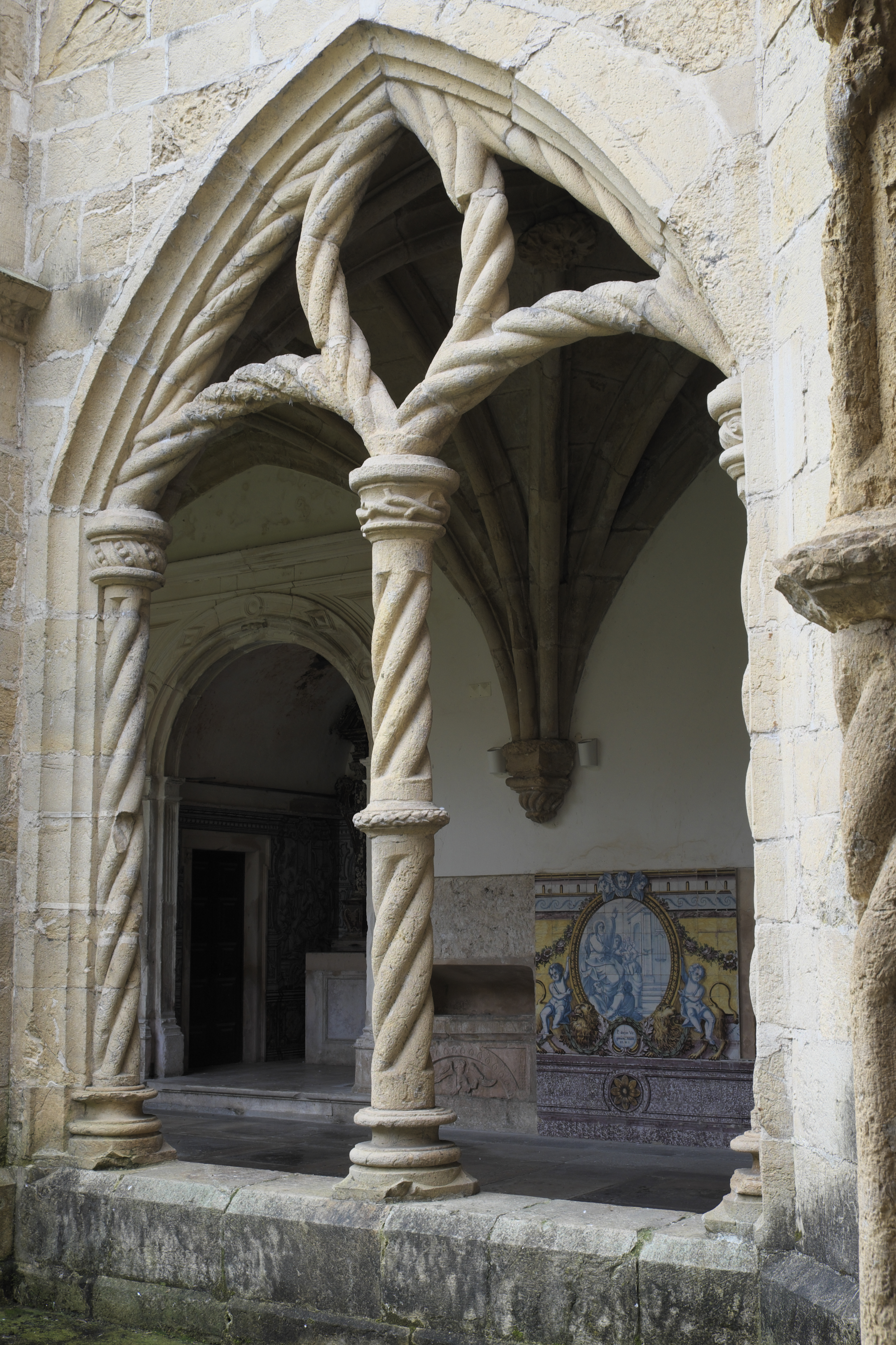 Kreuzgang Claustro do Silêncio des ehemaligen Augustinerchorherrenstifts Santa Cruz in Coimbra (Portugal)